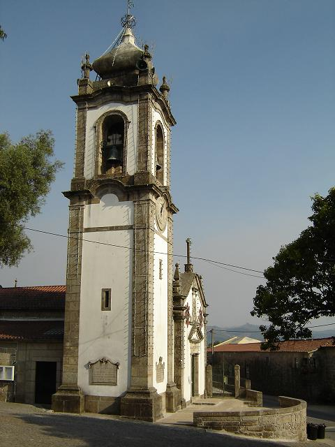 Igreja de Salvador de Briteiros, Portugal.